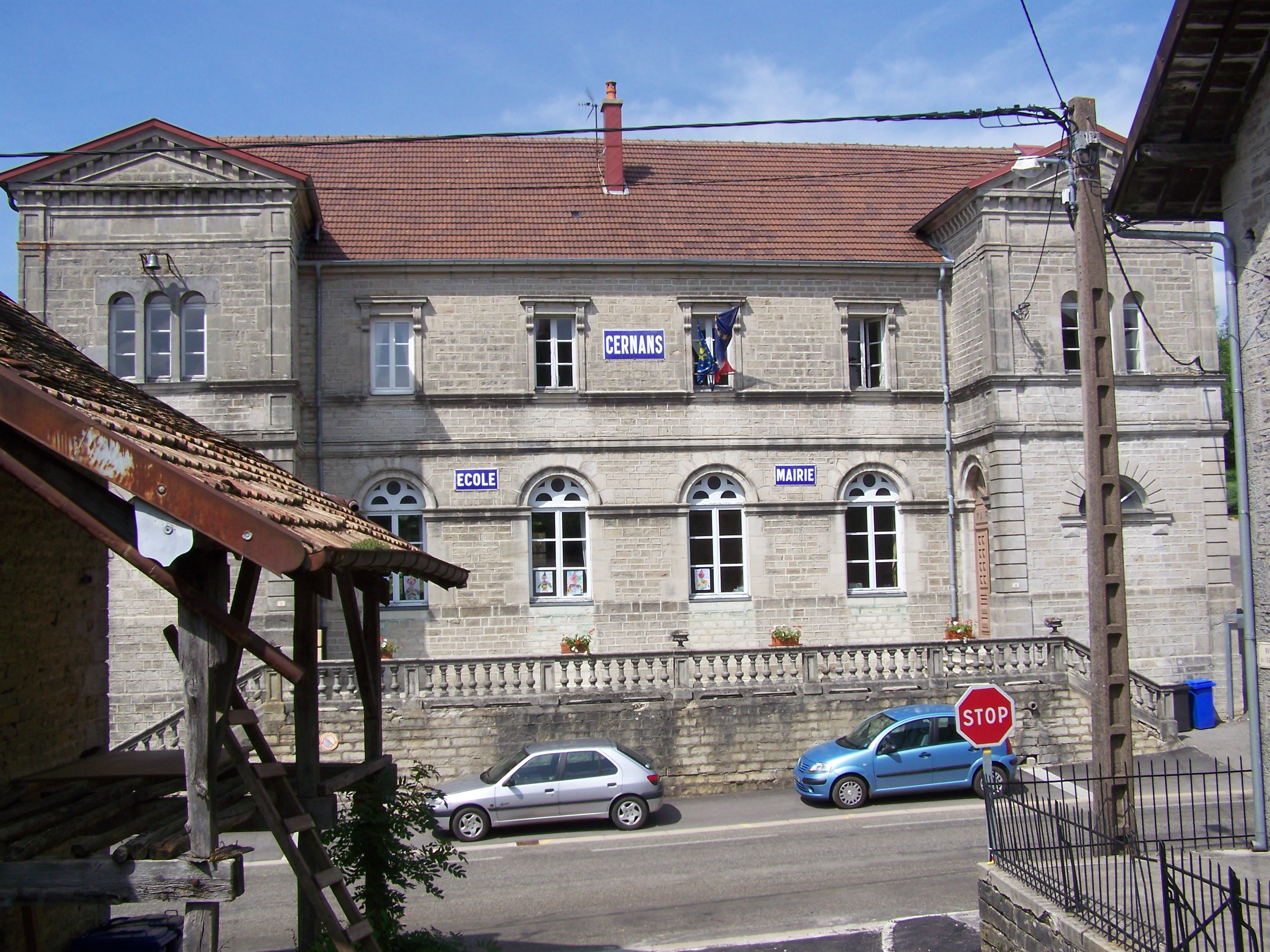 Mairie de CERNANS